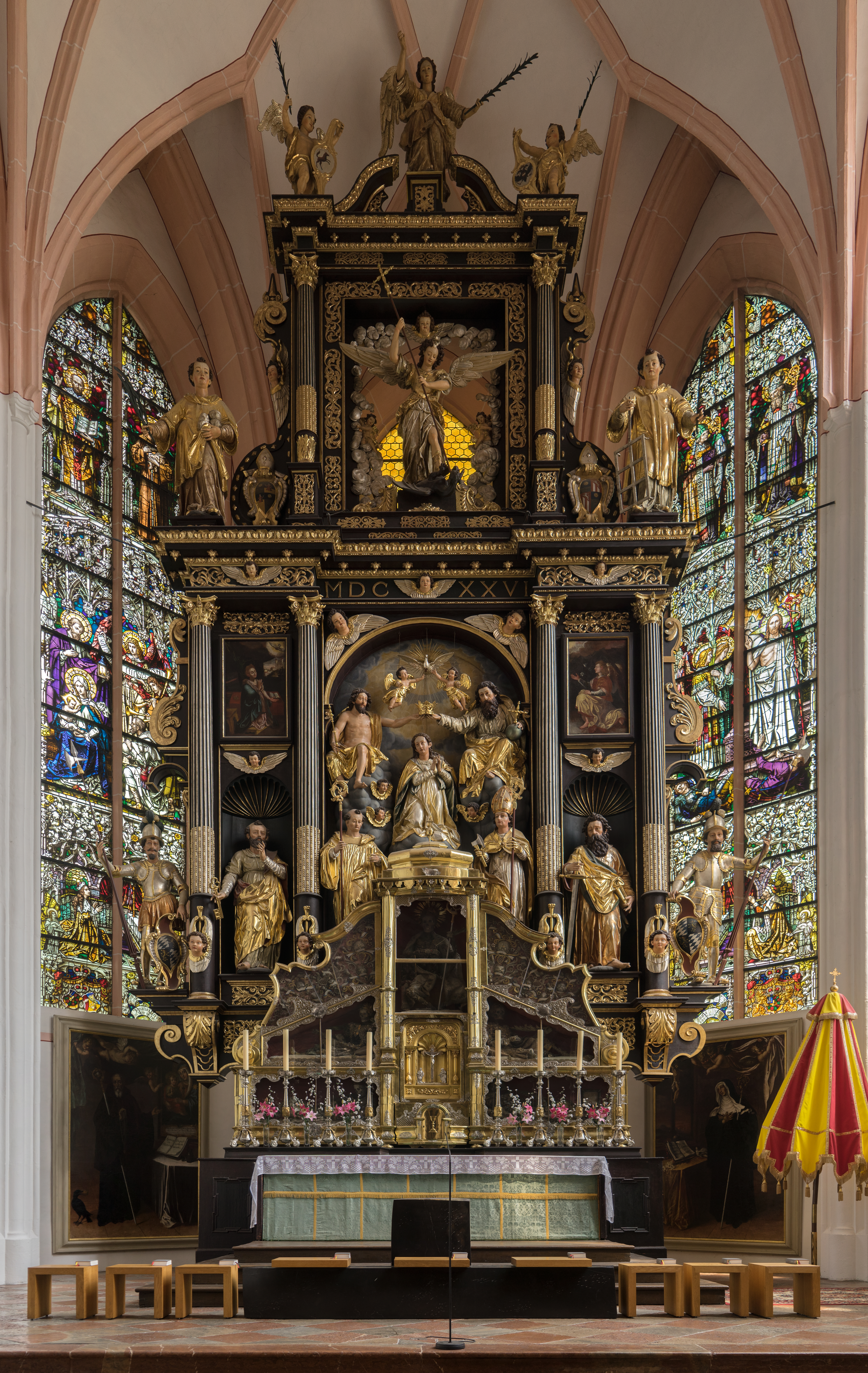 Basilika Mondsee. Altar von Hans Waldburger, 1626. Mit Reliquien.